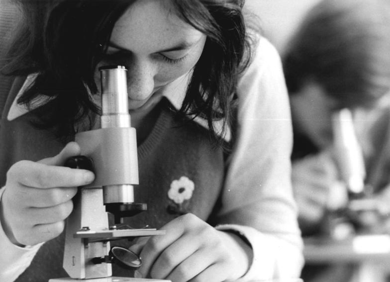 Langenstein, Auszubildende ADN-ZB Katscherowski 22.4.75 Bez. Magdeburg: Facharbeiterausbildung der BBS des VEG Saatzucht Langenstein. Um als Spezialist in der industriemäßigen Pflanzenproduktion bestehen zu können, eignet sich Ute Meves gründliche Kenntnisse an. Im 2. Lehrjahr der Ausbildung als Agrotechniker-Mechanisator steht im Fach Technologie der Stärkenachweis im Weizenkorn auf dem Lehrprogramm. Die künftigen Facharbeiter für die industriemäßige Pflanzenproduktion übernehmen entscheidende Aufgaben bei der Indsutriealisierung unserer Landwirtschaft. 188 Lehrlinge stehen zur Zeit in der Ausbildung. vergl. dazu P0422-4+6N